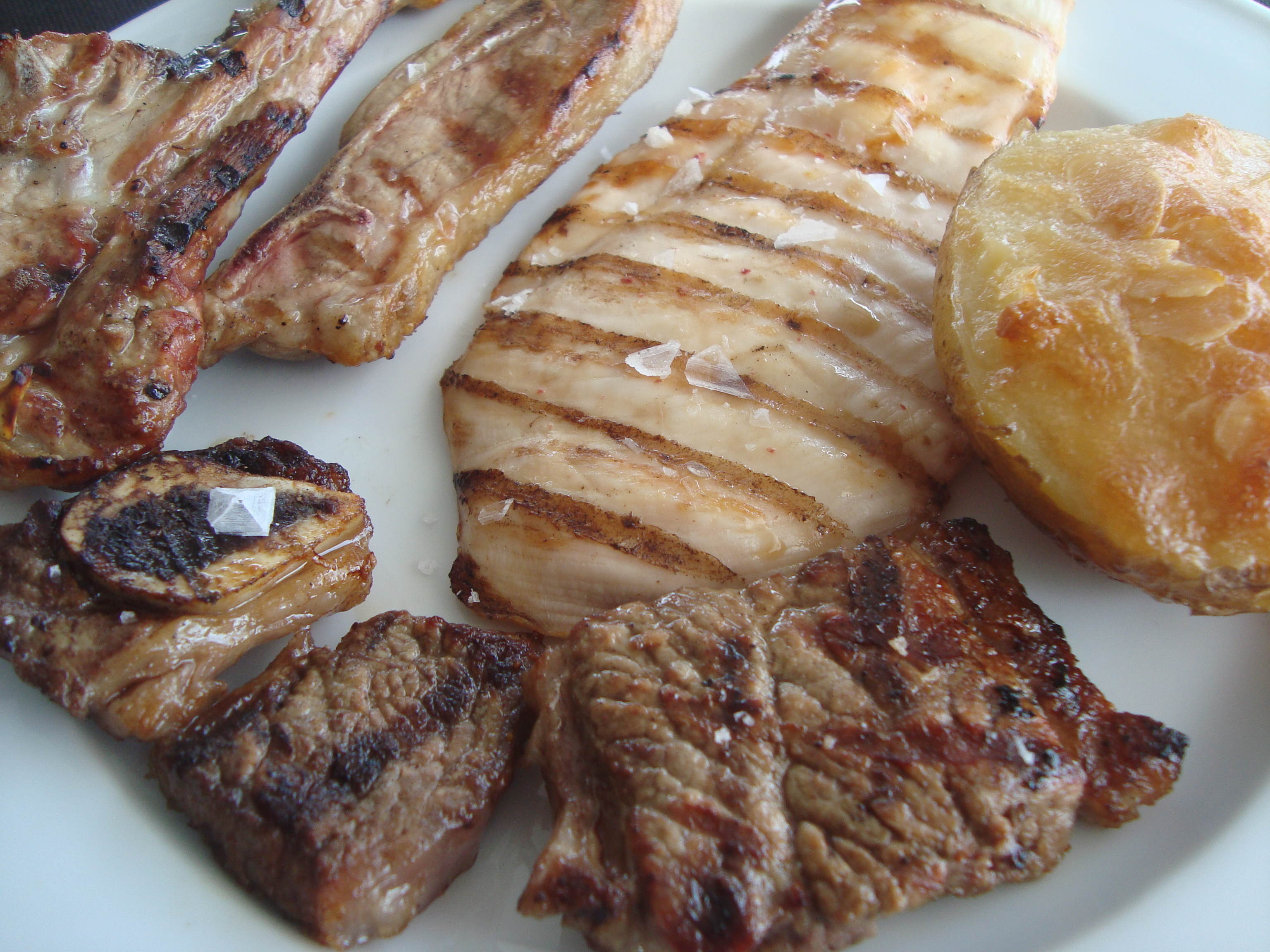 Plato de carnes variadas a la parrilla